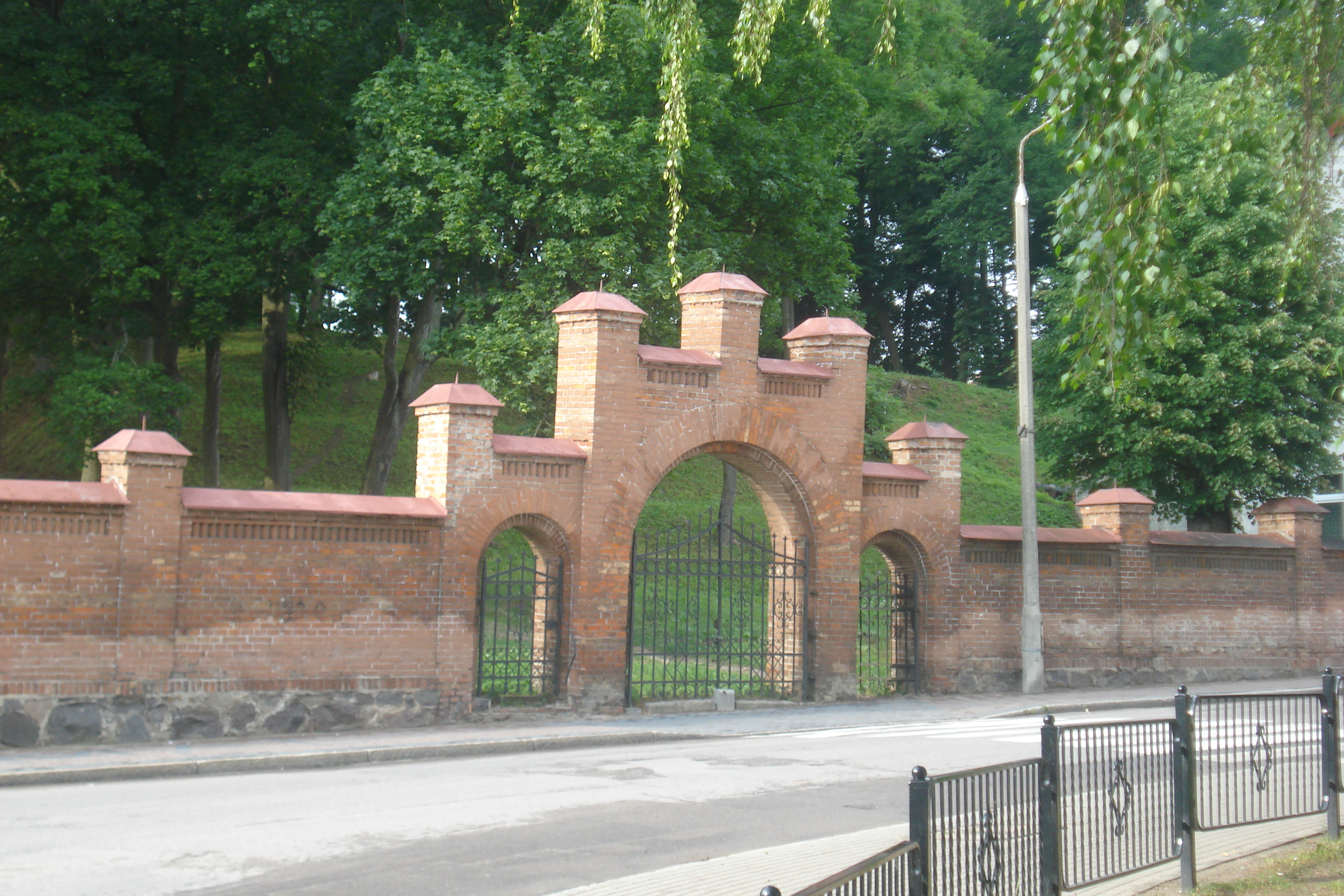 Barczewo: brama cmentarna